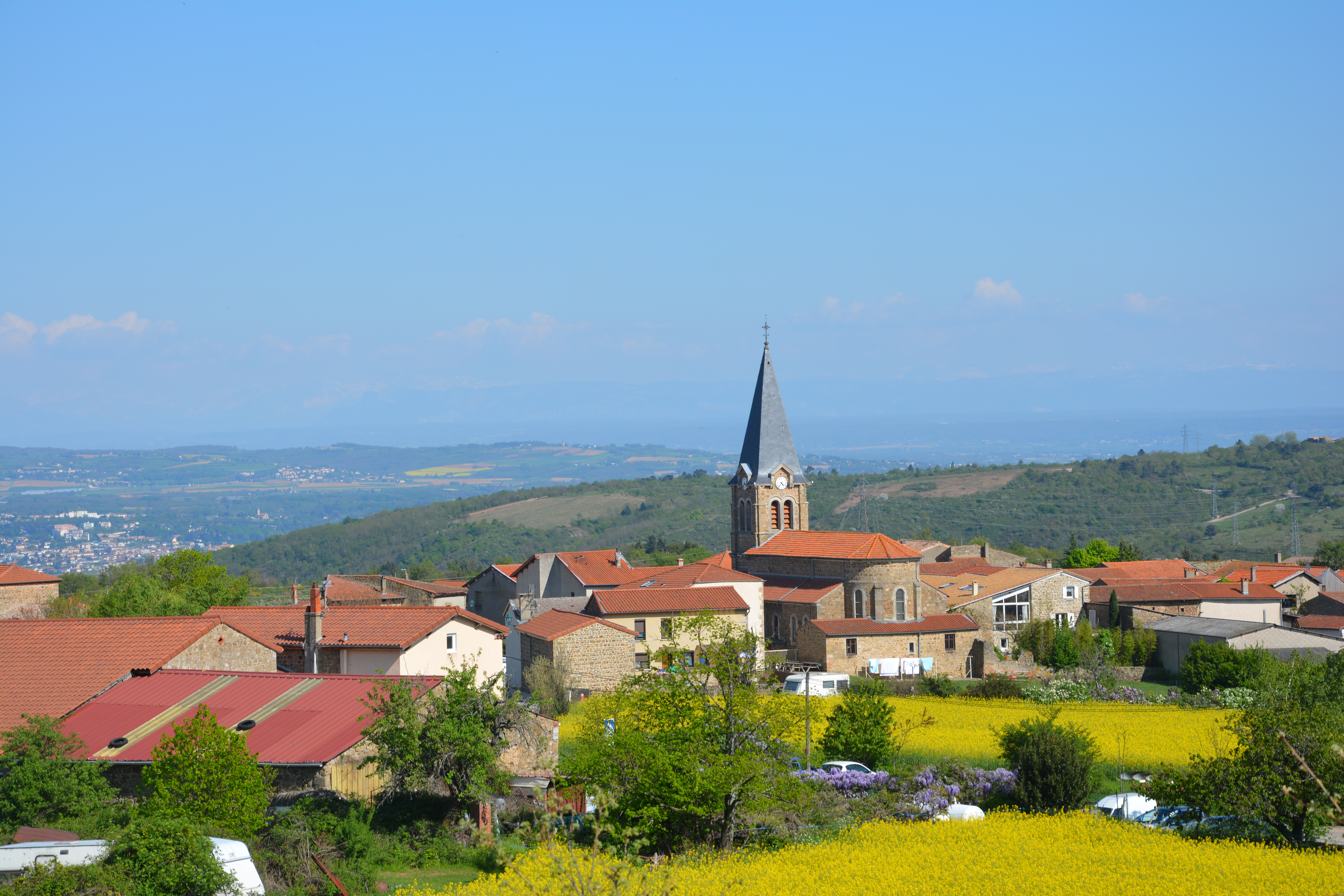 Vue du village de Bessey - 23/04/2015.